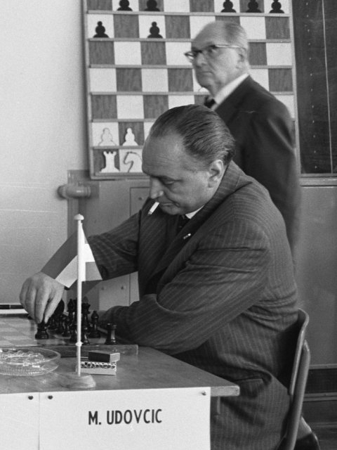 Derde IBM Meestertoernooi 1963 van start gegaan. M. Udovcic (Joegoslavië).